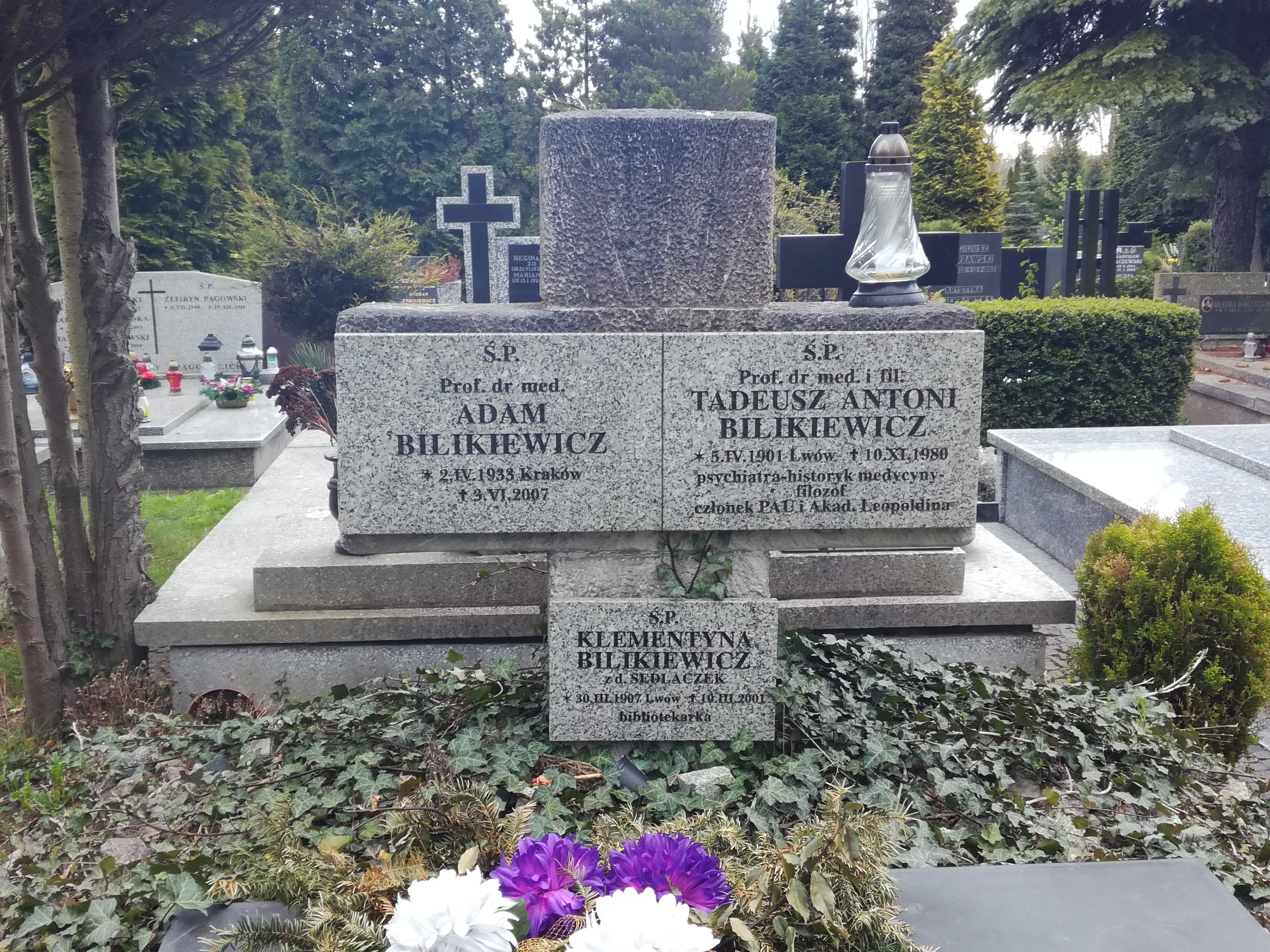 grób lekarzy Tadeusza Bilikiewicza i Adama Bilikiewicza na Cmentarzu Łostowickim w Gdańsku.